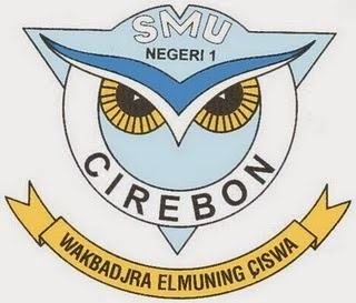 Logo SMU